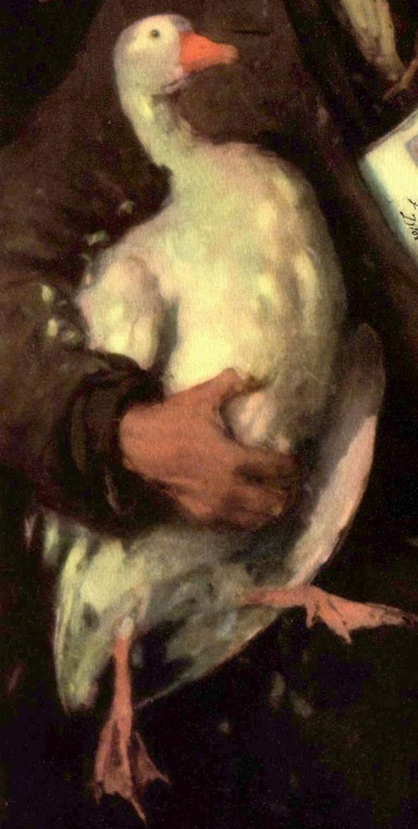 Evreu cu gâscă - detaliu - un evreu român care deține o petiție și o gâscă pentru dare de mită. Lucrarea, expusă la salonul din Paris în 1880, este una dintre cele mai importante ale pictorului. Este unul dintre tablourile de dimensiuni mari, în care pitorescul personajului se împleteşte cu caracterizarea psihologică. Dacă, de obicei, portretele lui Grigorescu sunt lucrate în tuşă lisă, de aceasta dată sunt folosite pete largi, distincte, astfel încât volumele sunt realizate fin în faţete. Semnat jos spre mijloc-stânga, cu roşu: „Grigorescu”.